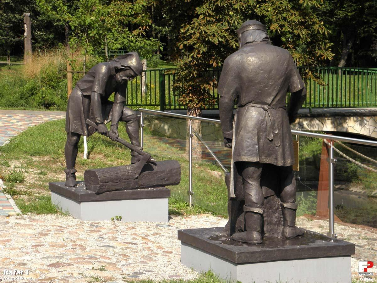 Figury cieśli i kowala podczas pracy.